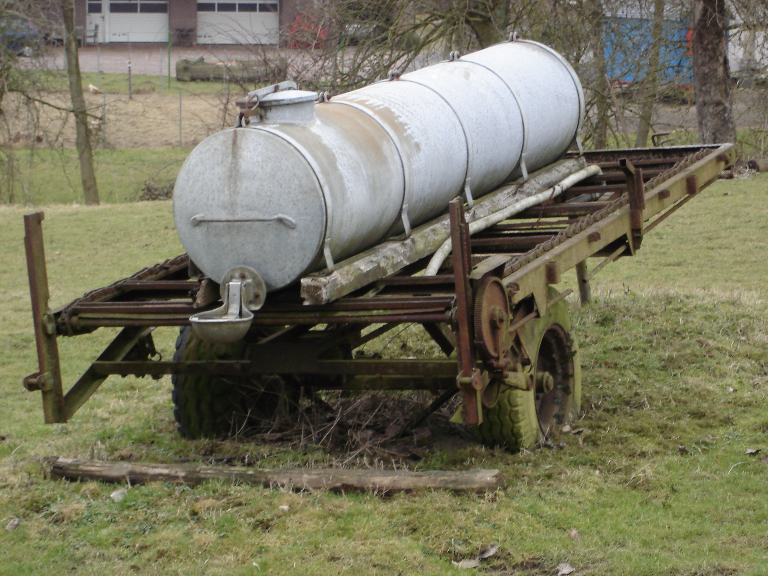 Selbsttränke für Kühe, Kreis Lippe, NRW, Deutschland 2012